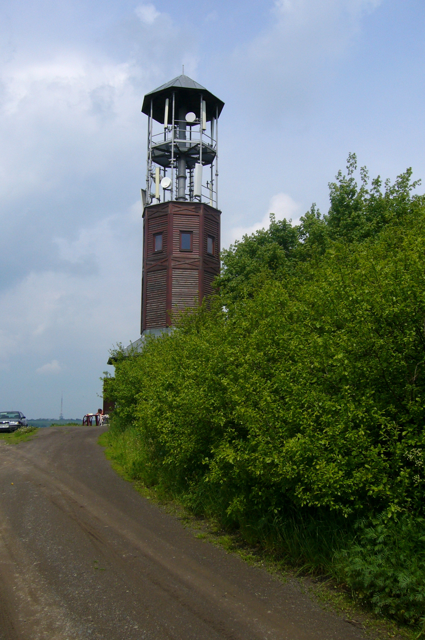 Rozhledna Horka u Náčkovic v Českém středohoří